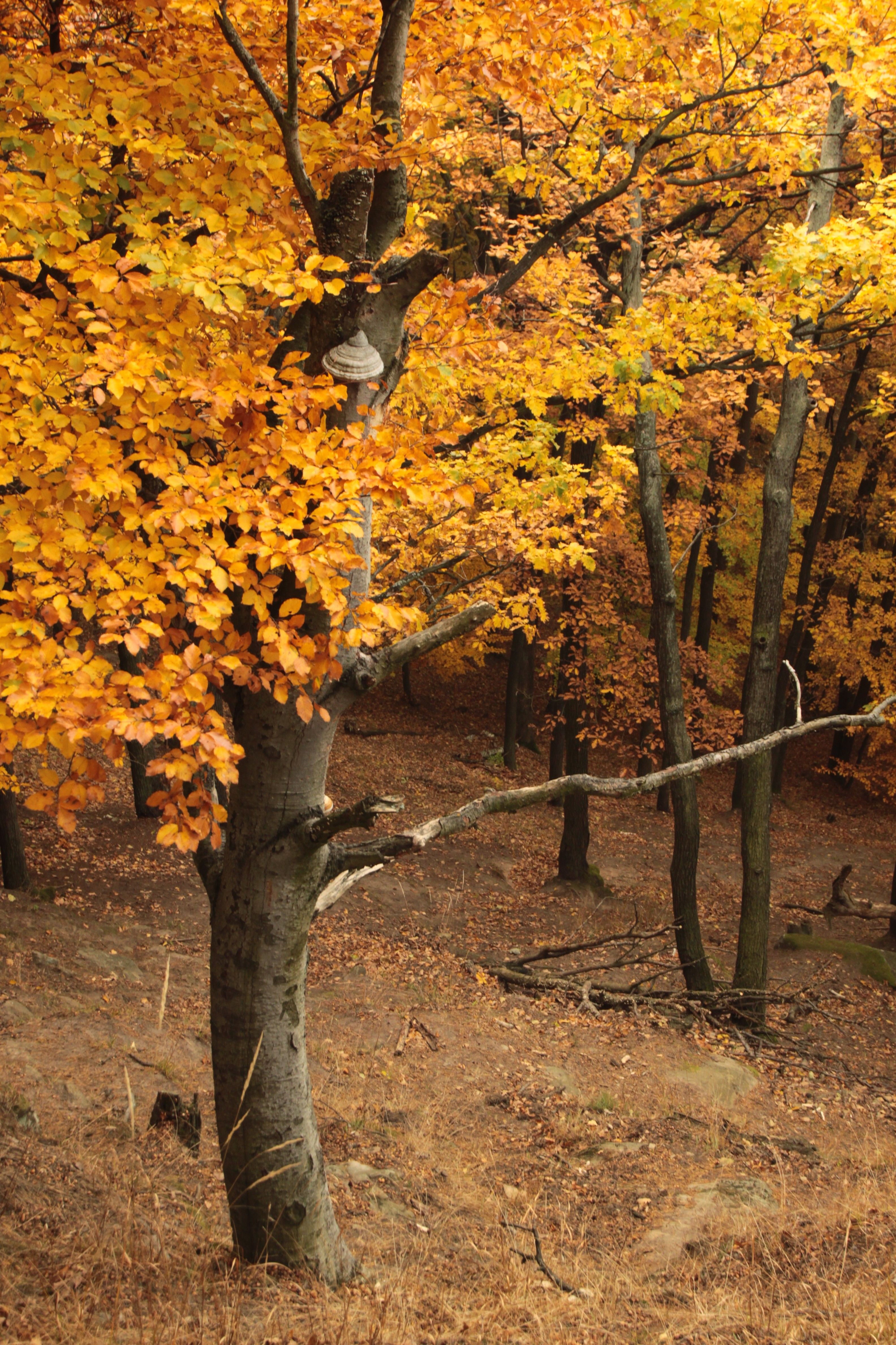 Dubohabřiny